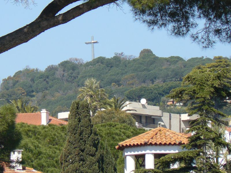 Colline de la Croix-des-Gardes à Cannes, surmontée de sa croix éponyme, un repère pour les avions en branche vent arrière se posant sur l'aérodrome de Cannes Mandelieu